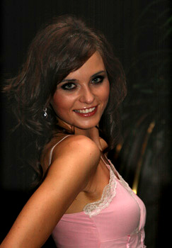 Miss Poland 2007 - Karolina Zakrzewska in Miss World 2007, Sanya, China